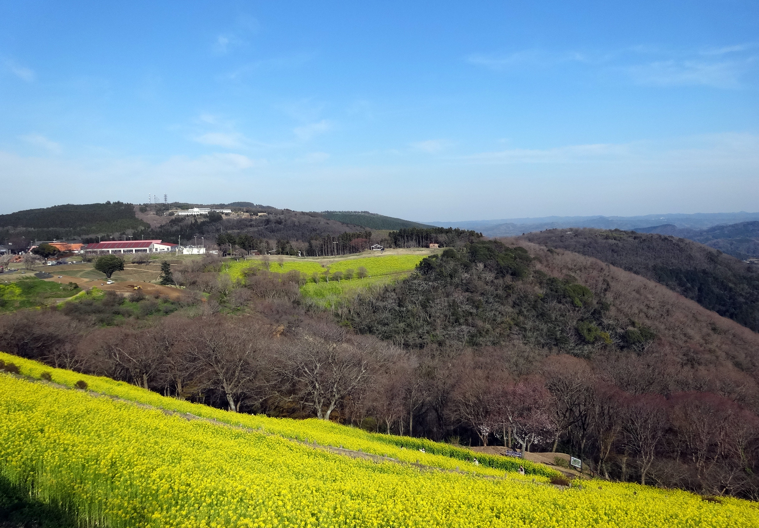 花の大斜面・西の景色